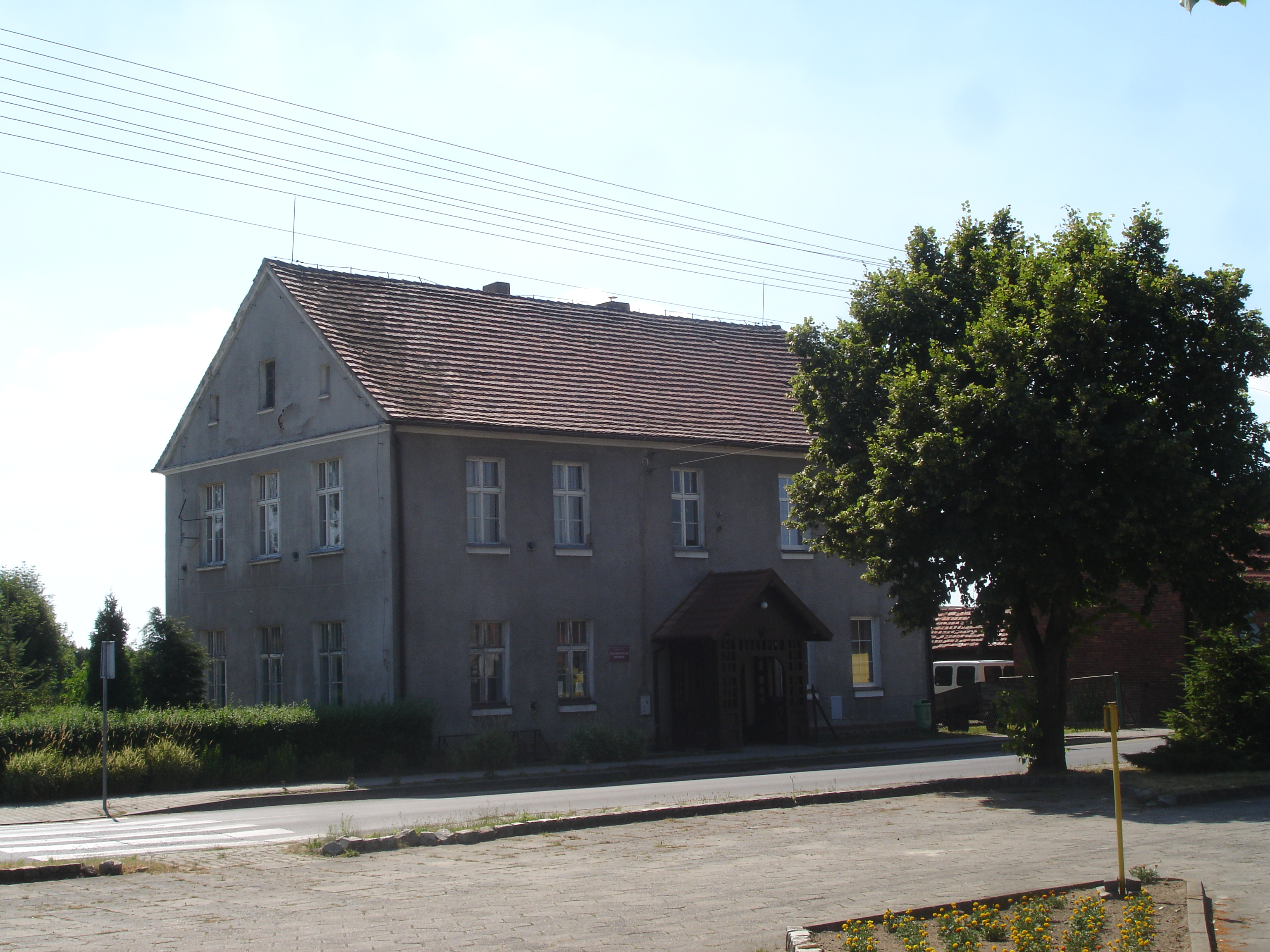 Dawny budynek szkolny w Pawłowicach, obecnie siedziba biblioteki i Izby Regionalnej